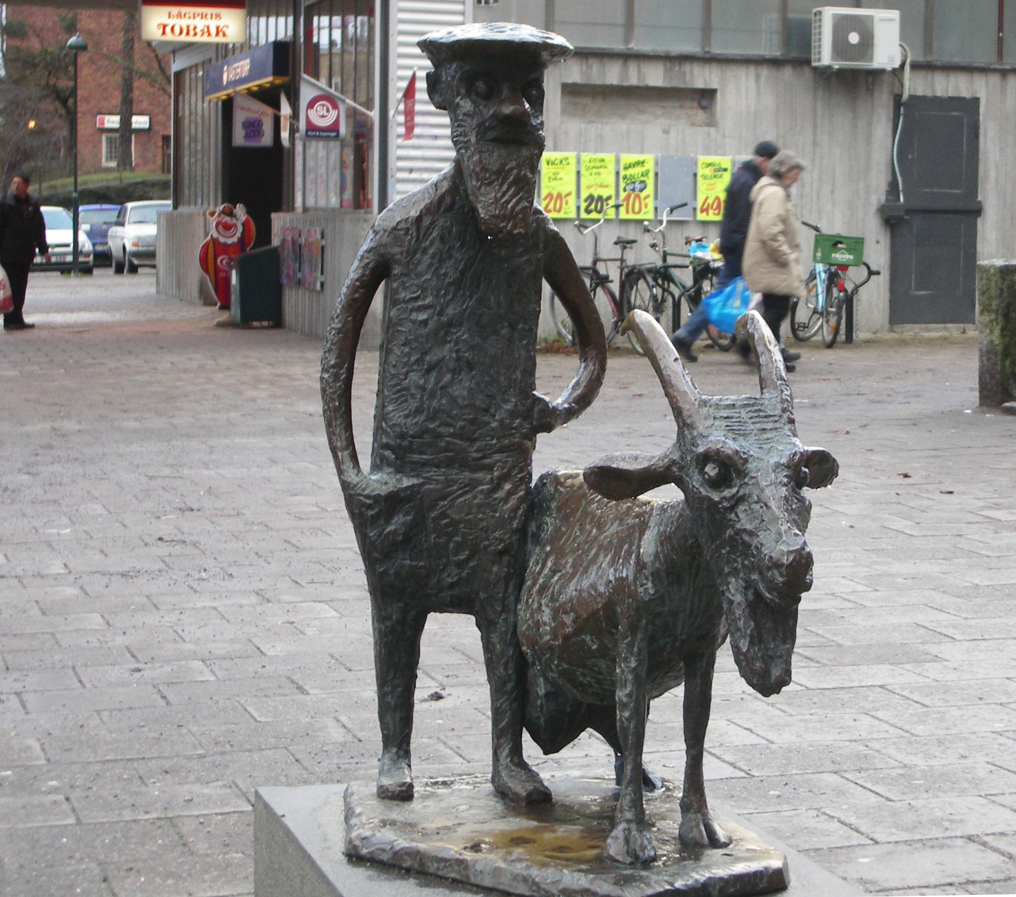 Allan Runefelts Gubben med geten, Västertorps centrum, Stockholm